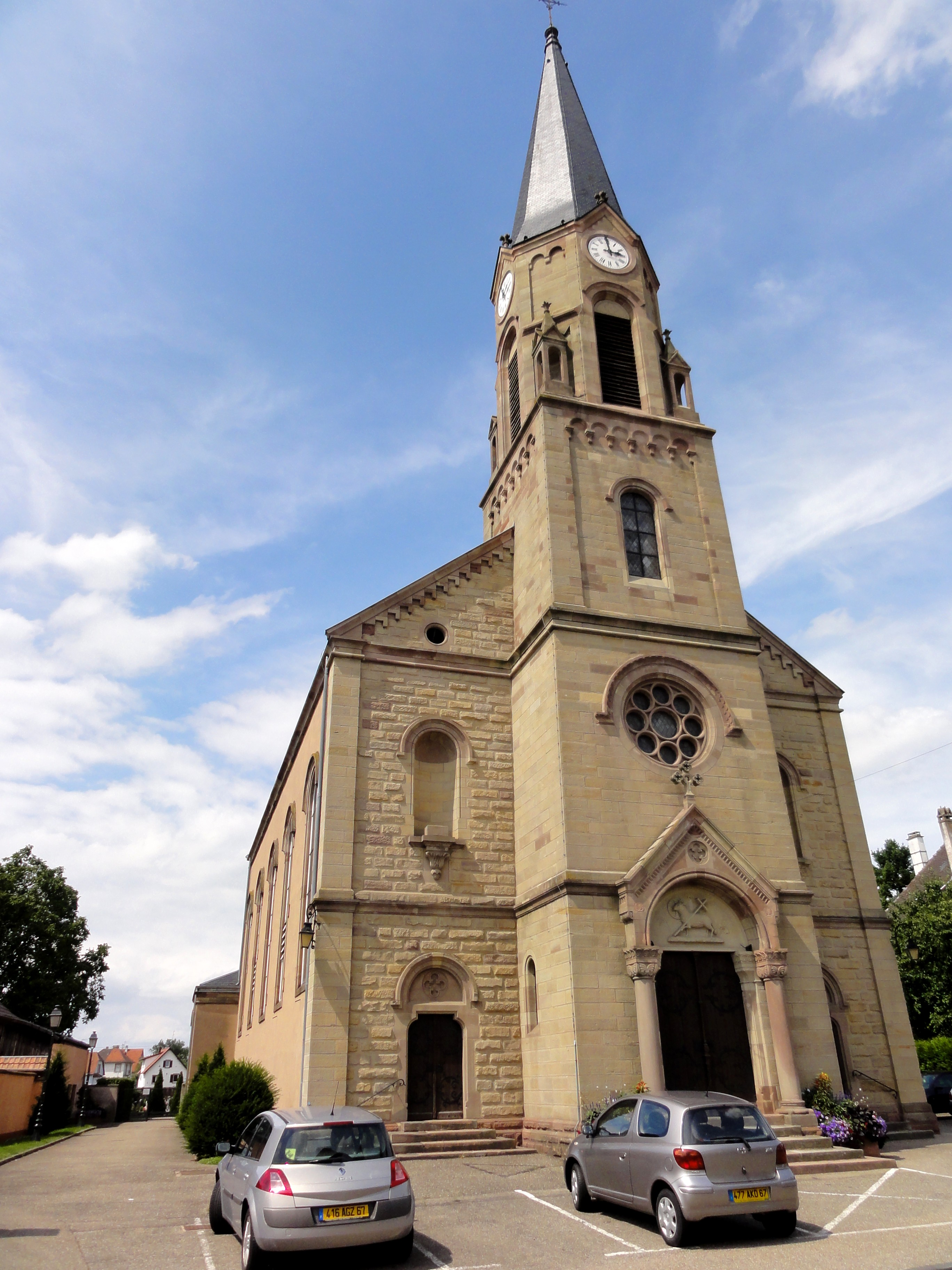 Alsace, Bas-Rhin, Eckbolsheim, Église catholique Saint-Cyprien (1886)